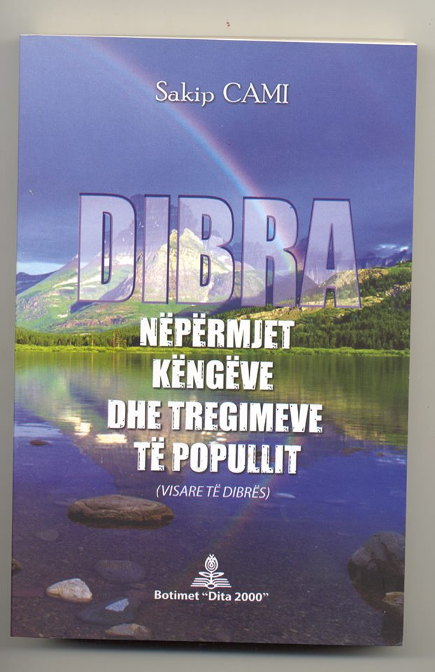 Dibra